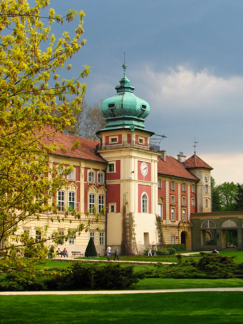 Łańcut - Zamek Lubomirskich i Potockich